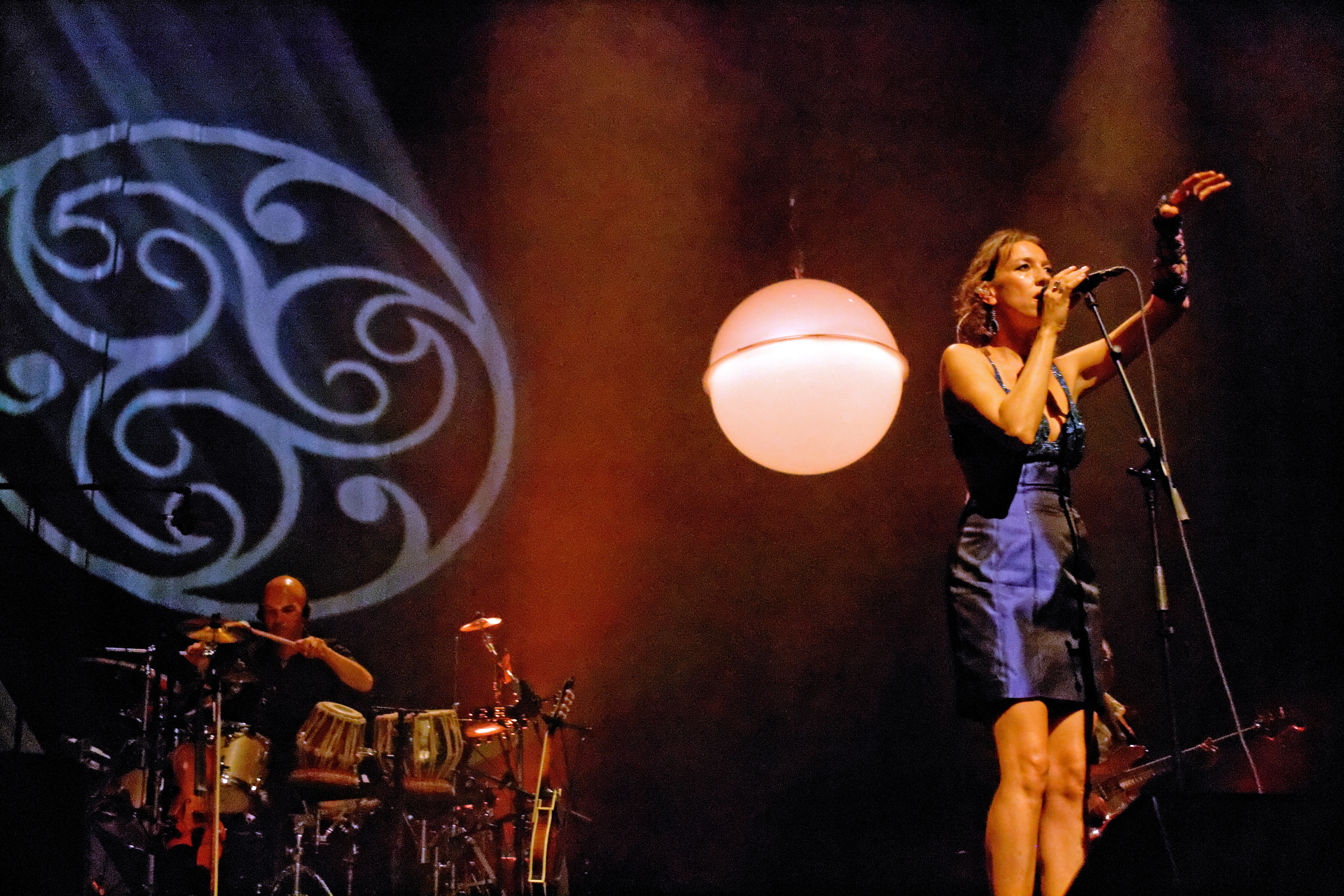 Gwennyn en concert au théâtre de Cornouaille lors du festival de Cornouaille à Quimper le 25 juillet 2014.